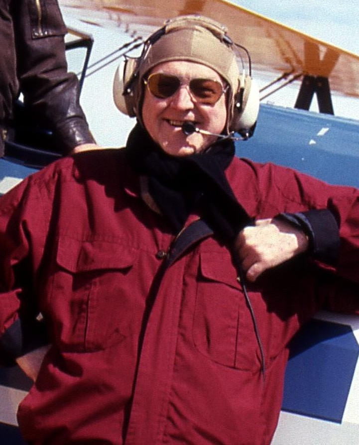 Comedian Karl Axel Ternberg. Stage name:"Kalle Sändare"